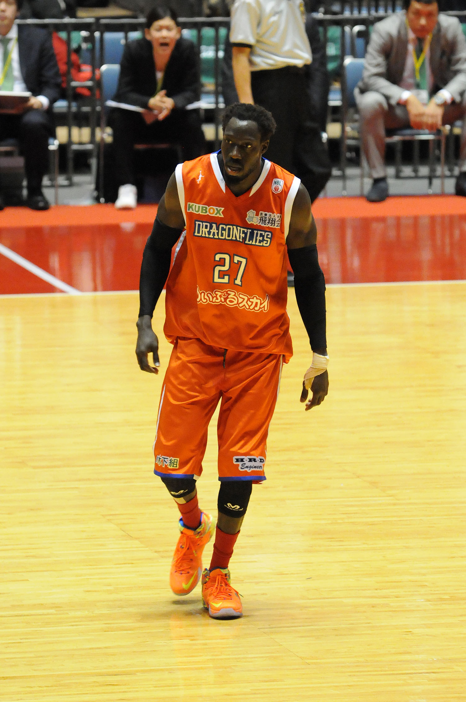 広島ドラゴンフライズ、ファイ・パプ・ムール選手。代々木第一体育館で。